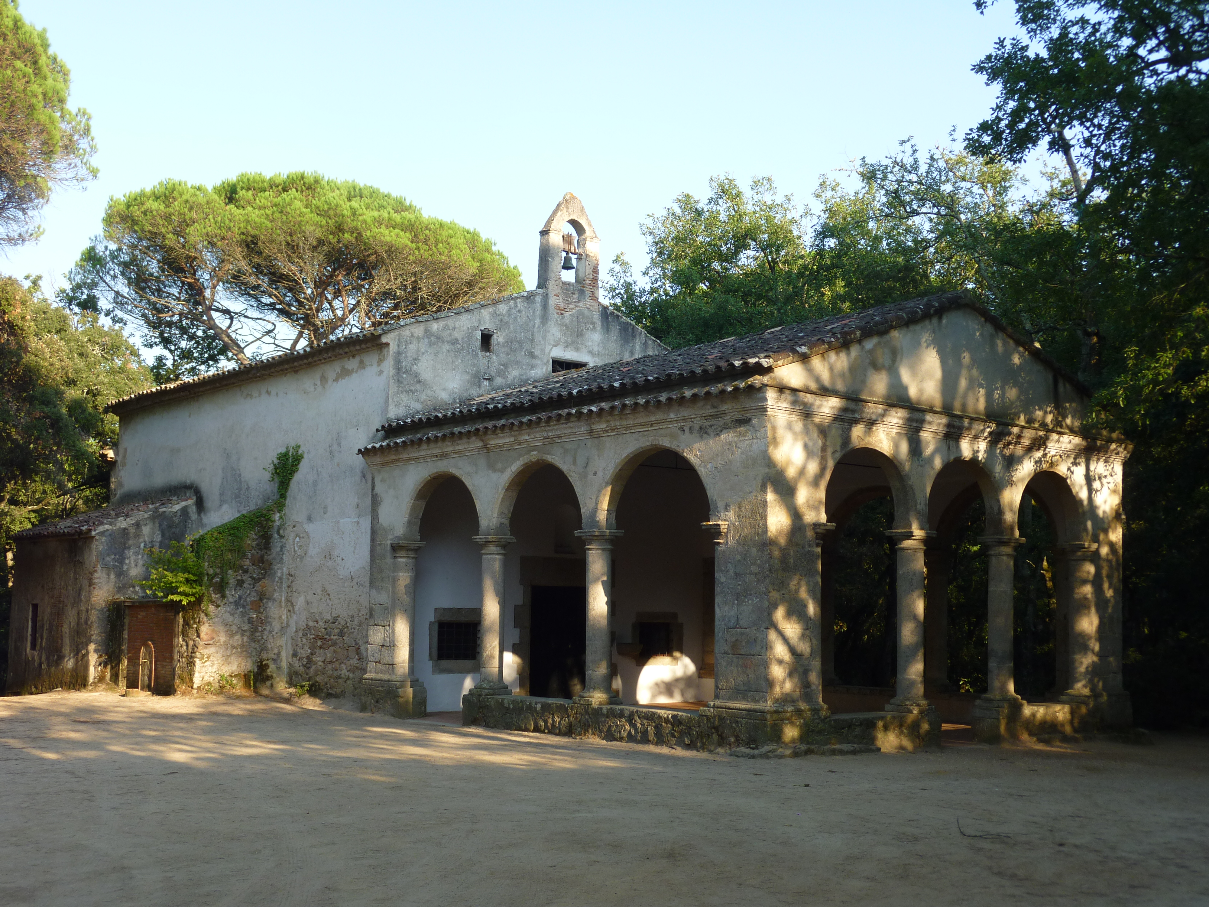 Façana principal de l'ermita de Sant Ponç (Tordera)